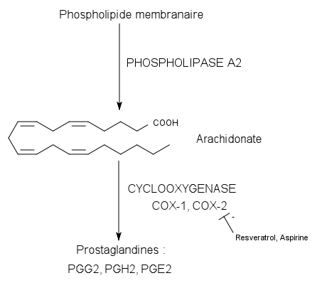 voie de la cyclo-oxygénase